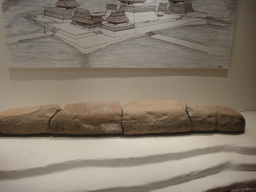 Template:Plazuelas phallus